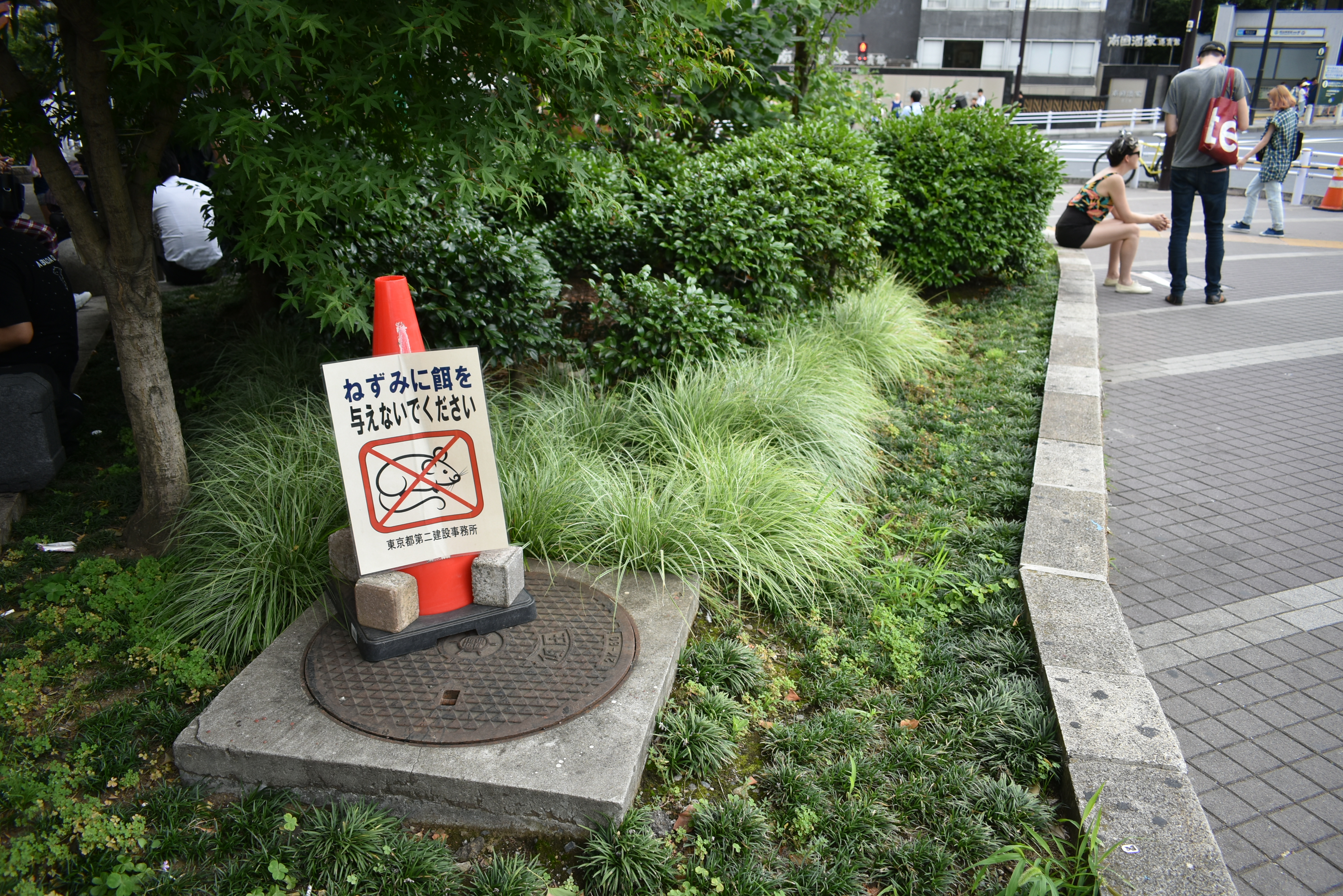 原宿駅前 「ネズミに餌を与えないで下さい」